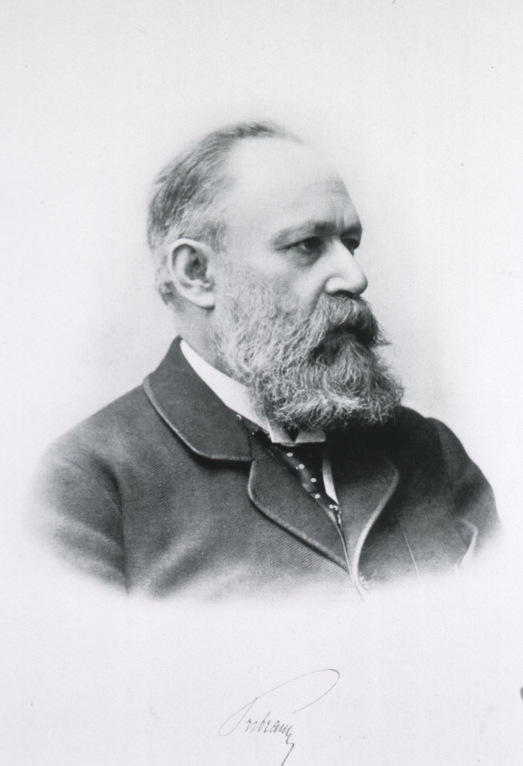 Alfred Pribram (1841-1912), Professor für Medizin an der Universität Prag